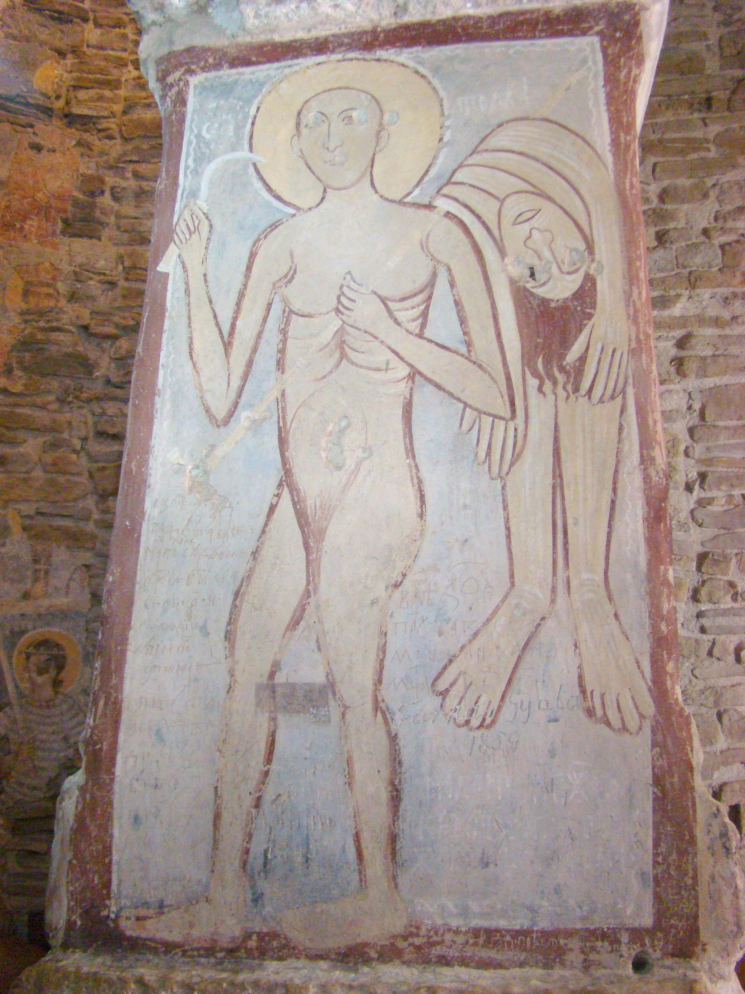 Biserica „Sf.Nicolae”, Densuș, Hunedoara